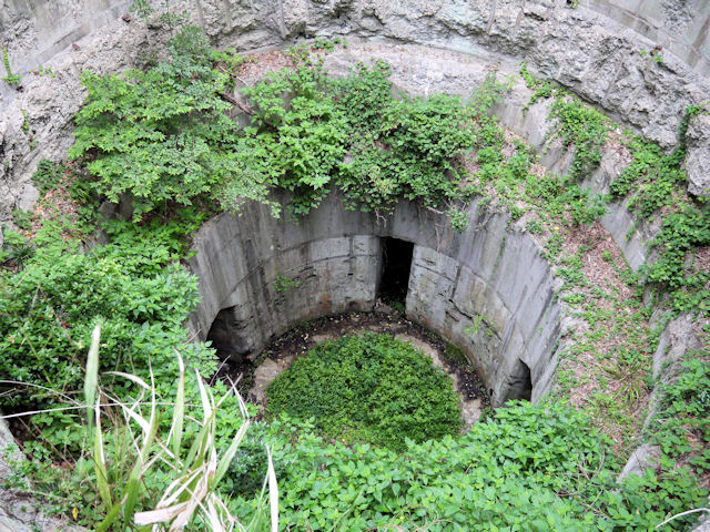 豊砲台跡（長崎県対馬市上対馬町）